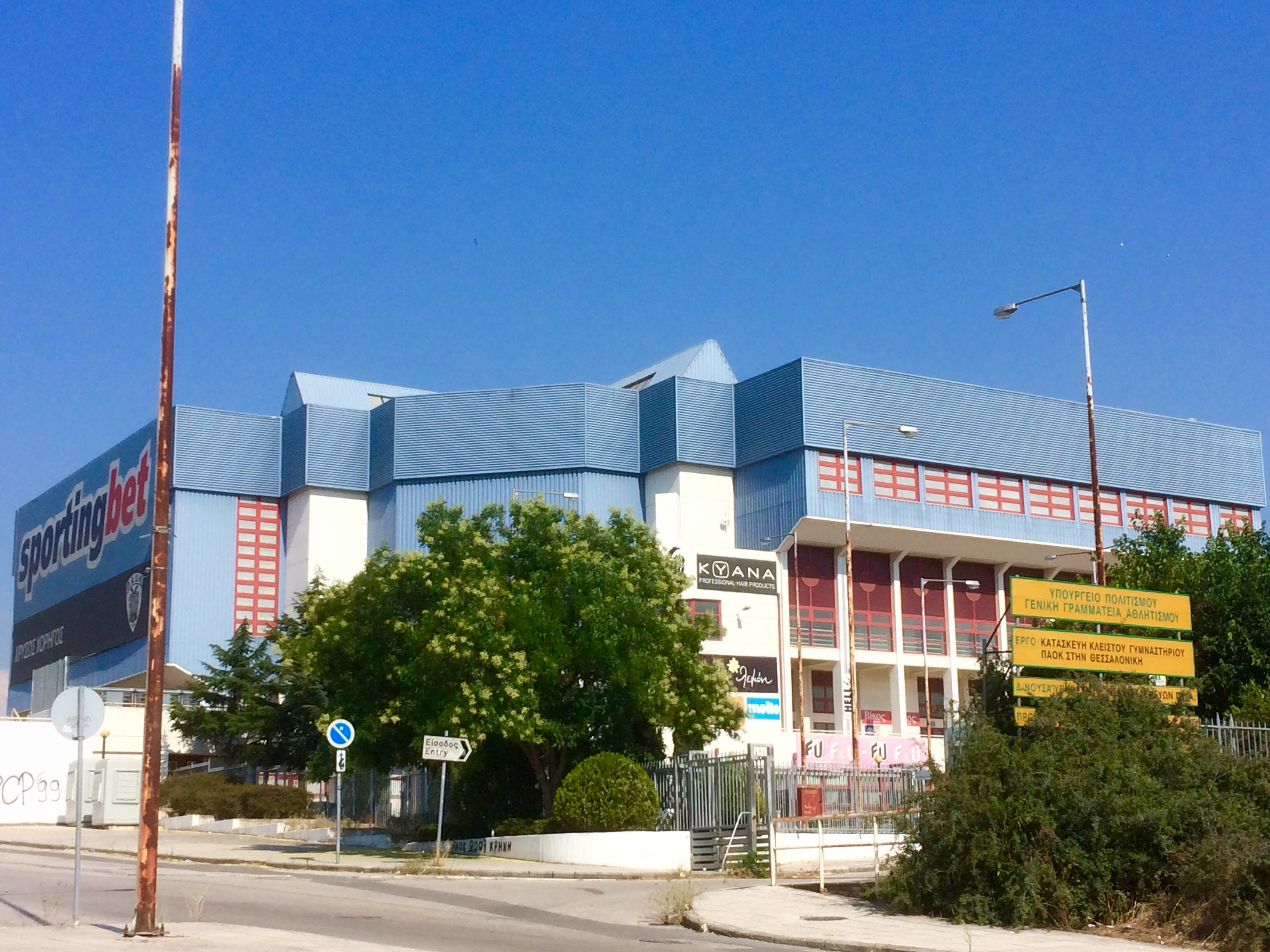 PAOK Sports Arena Aussen